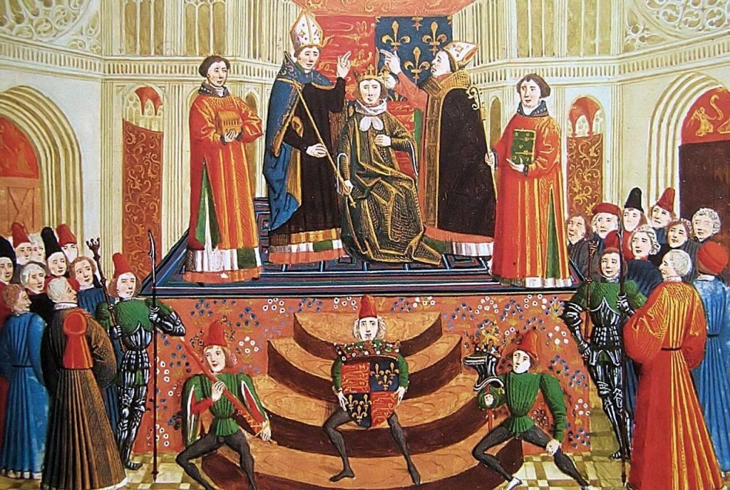 kjjjjjjjl